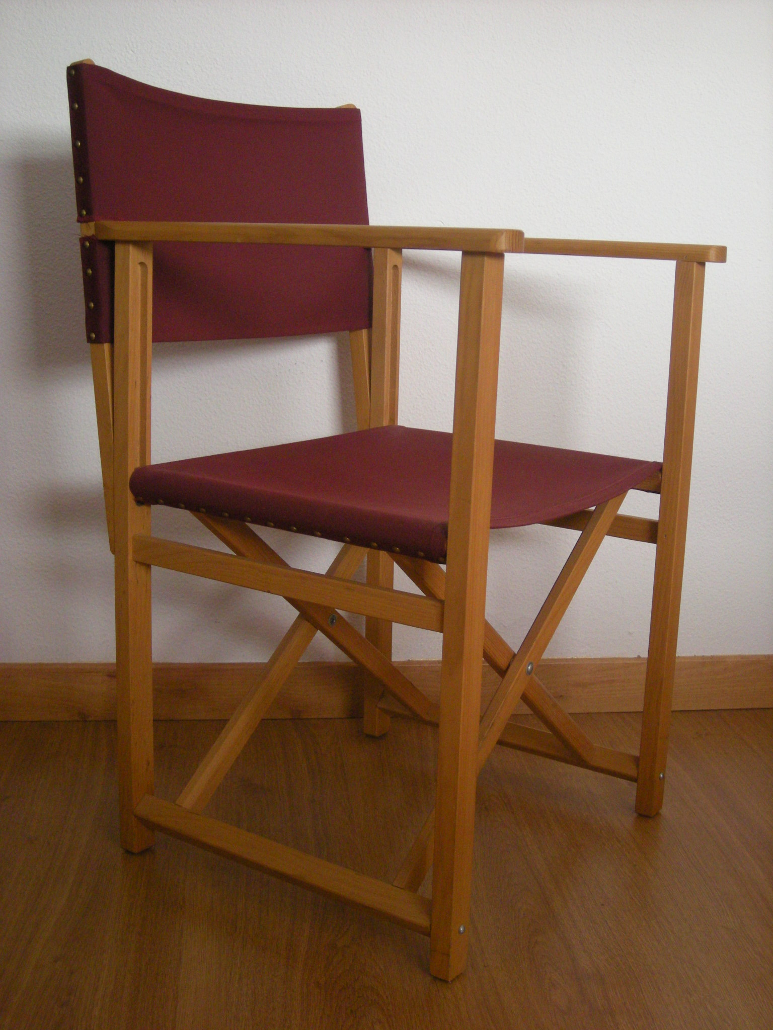 Cadira de Menorca, popularment anomenada Coca Rossa o Cocarossa.